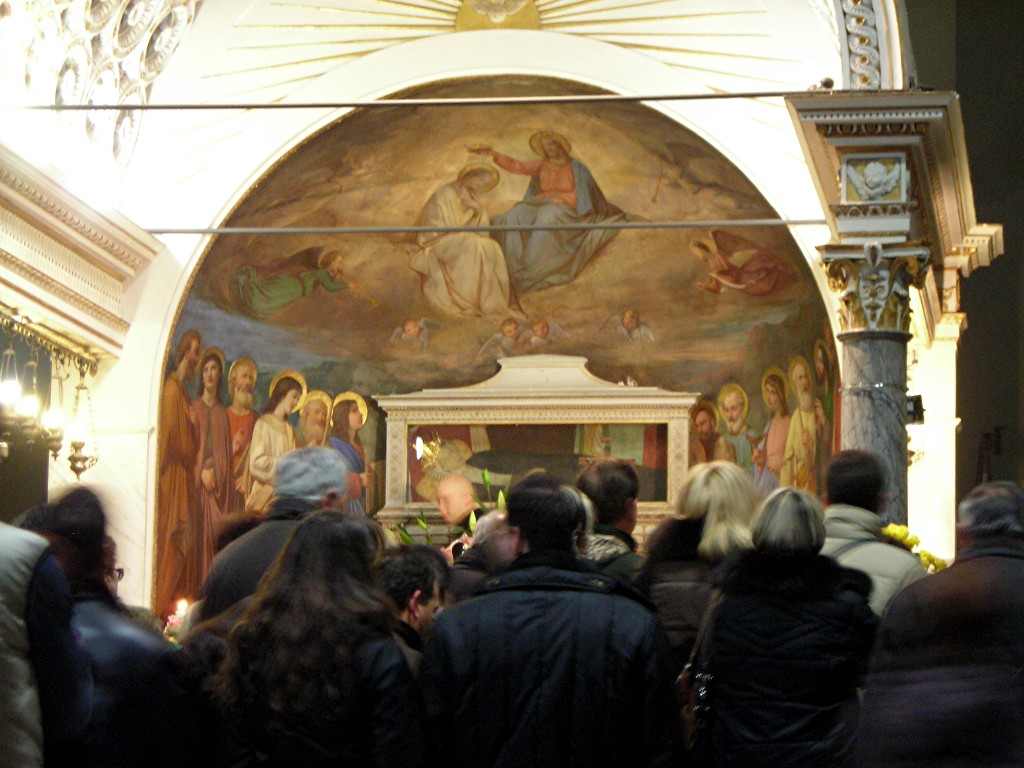 Canoscio church, apse